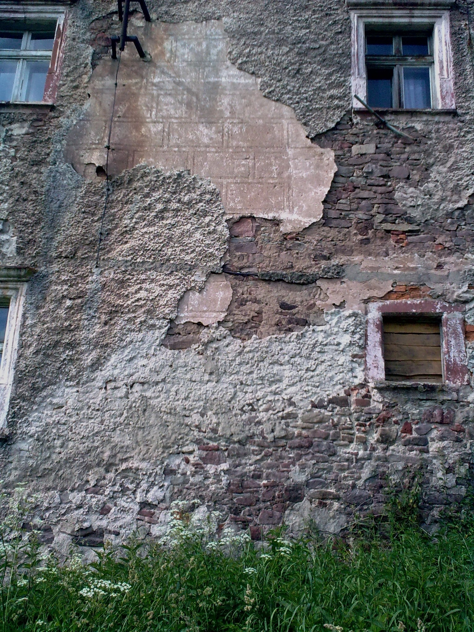 Włodowice, dwór